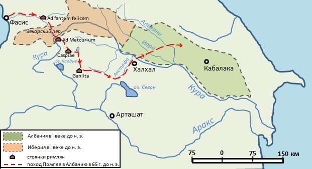 Второй поход Помпея против албан в 65 году до н. э. Карта создана на основе карты из статьи Я. Манандяна "Круговой путь Помпея в Закавказье" (Вестник древней истории, 1939. № 4, с. 79) и карты "Закавказье во II-I вв. до н.э." из II тома "Всемирной истории" (1956).